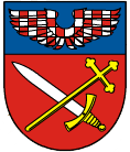 Znak obce Blatec